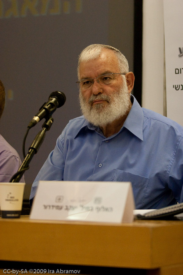 AntiBiometrics-7212